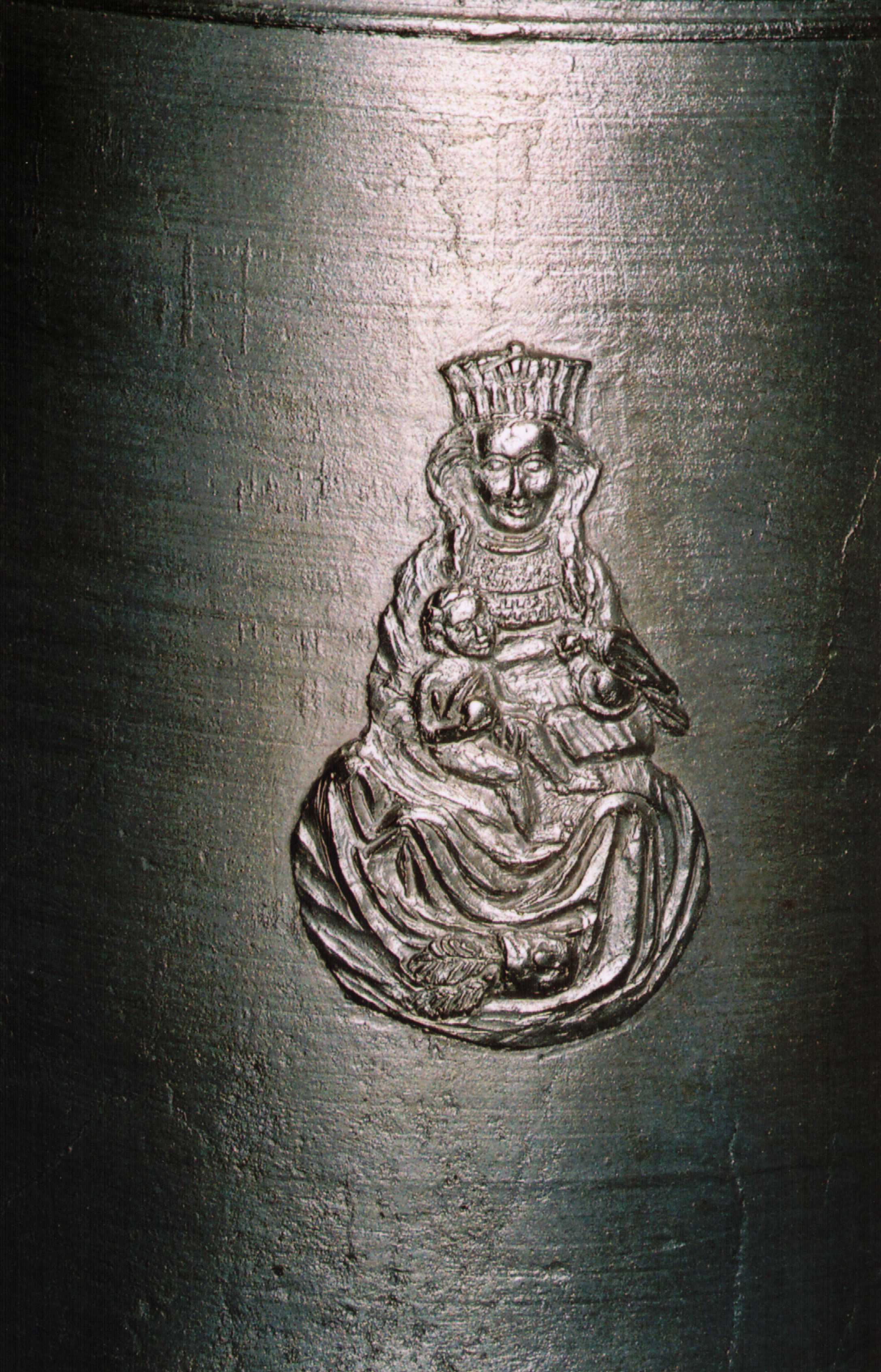 Beckum (St. Stephanus) Maria-Blumenthal-Glocke von 2008 (Relief)